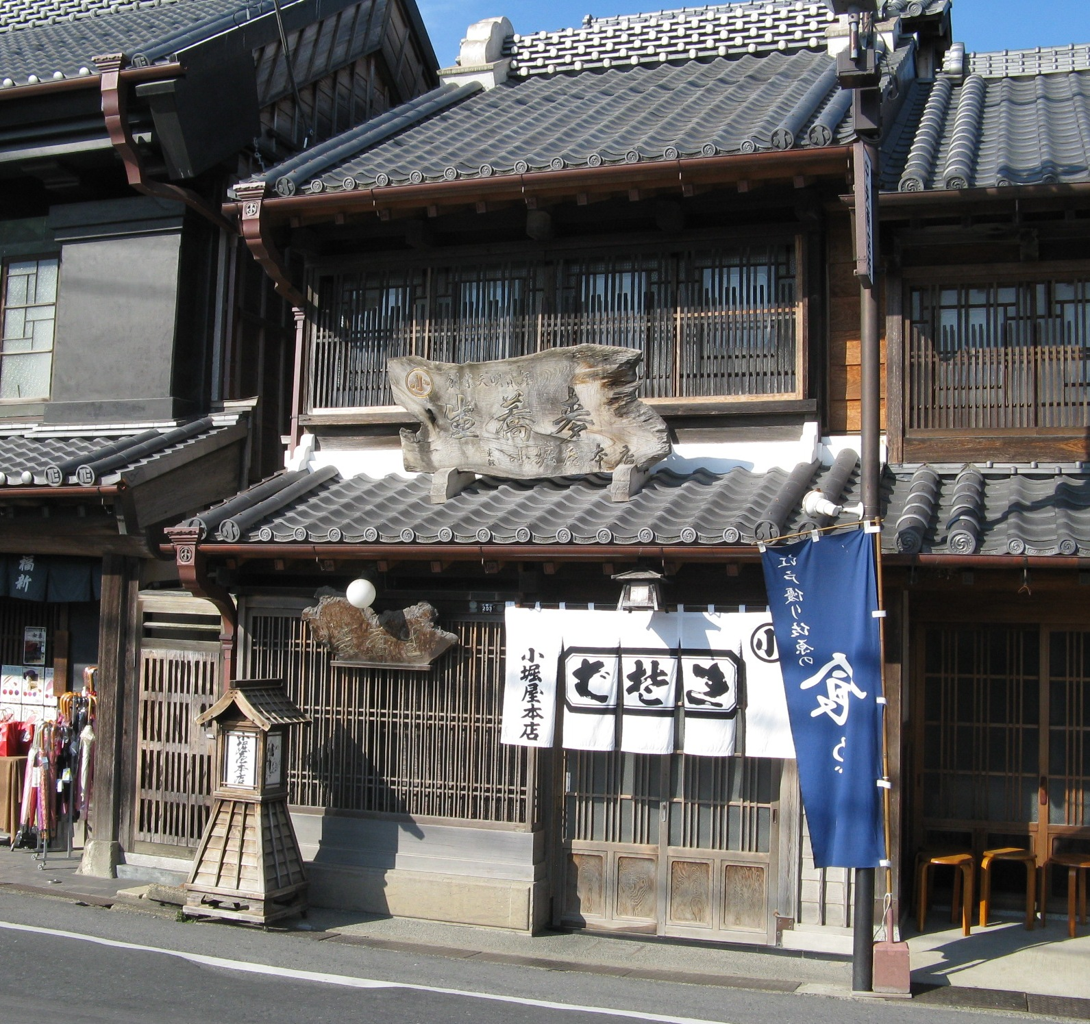 小堀屋本店。千葉県香取市。